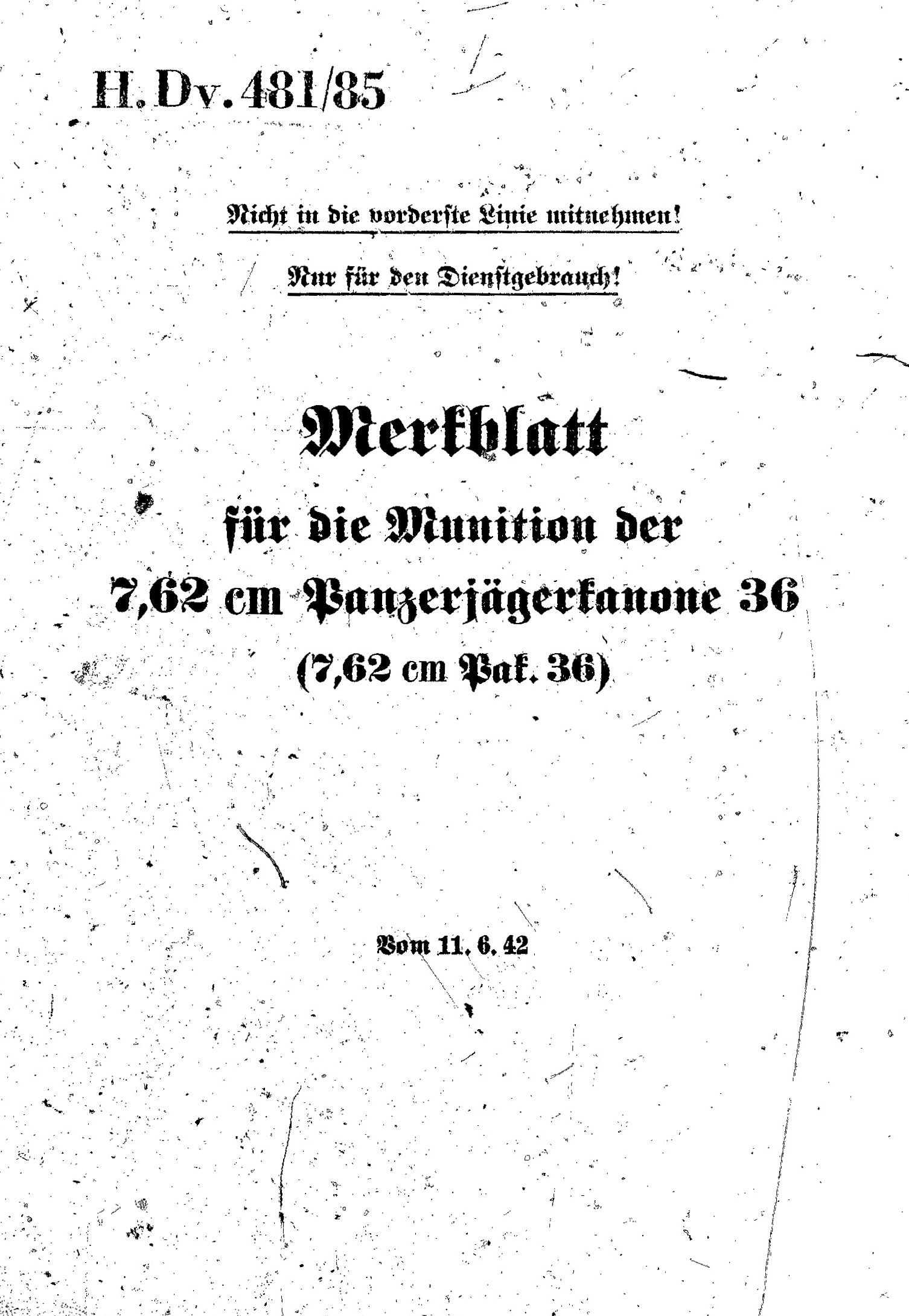 Обложка брошюры с описанием боеприпасов к противотанковой пушке 7,62 cm Pak. 36.